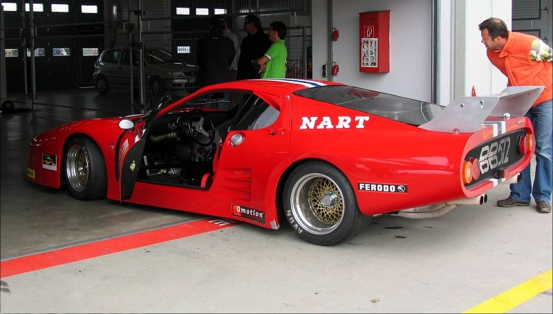 Ferrari 512 BB LeMans